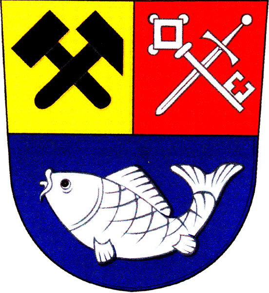 Znak obce Šlapanov